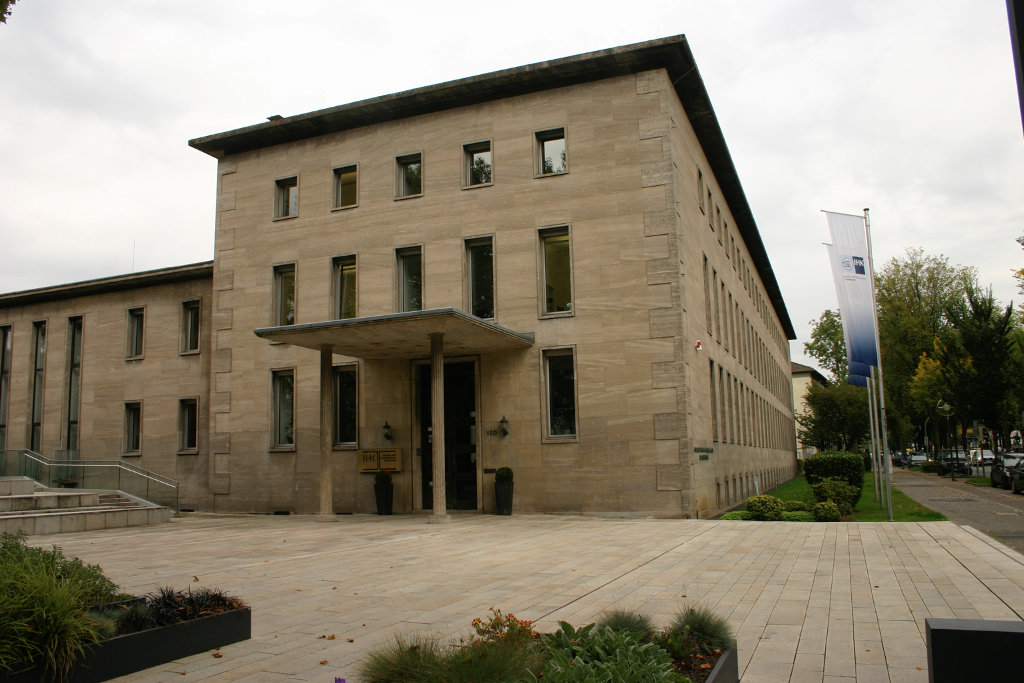 Industrie- und Handelskammer DortmundThis is a photograph of an architectural monument., no. A 0330